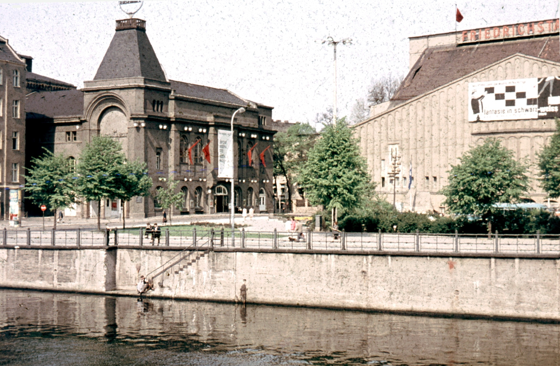 "Berliner Ensemble" und alter Friedrichstadtpalast; von einem eigenen Dia gescannt